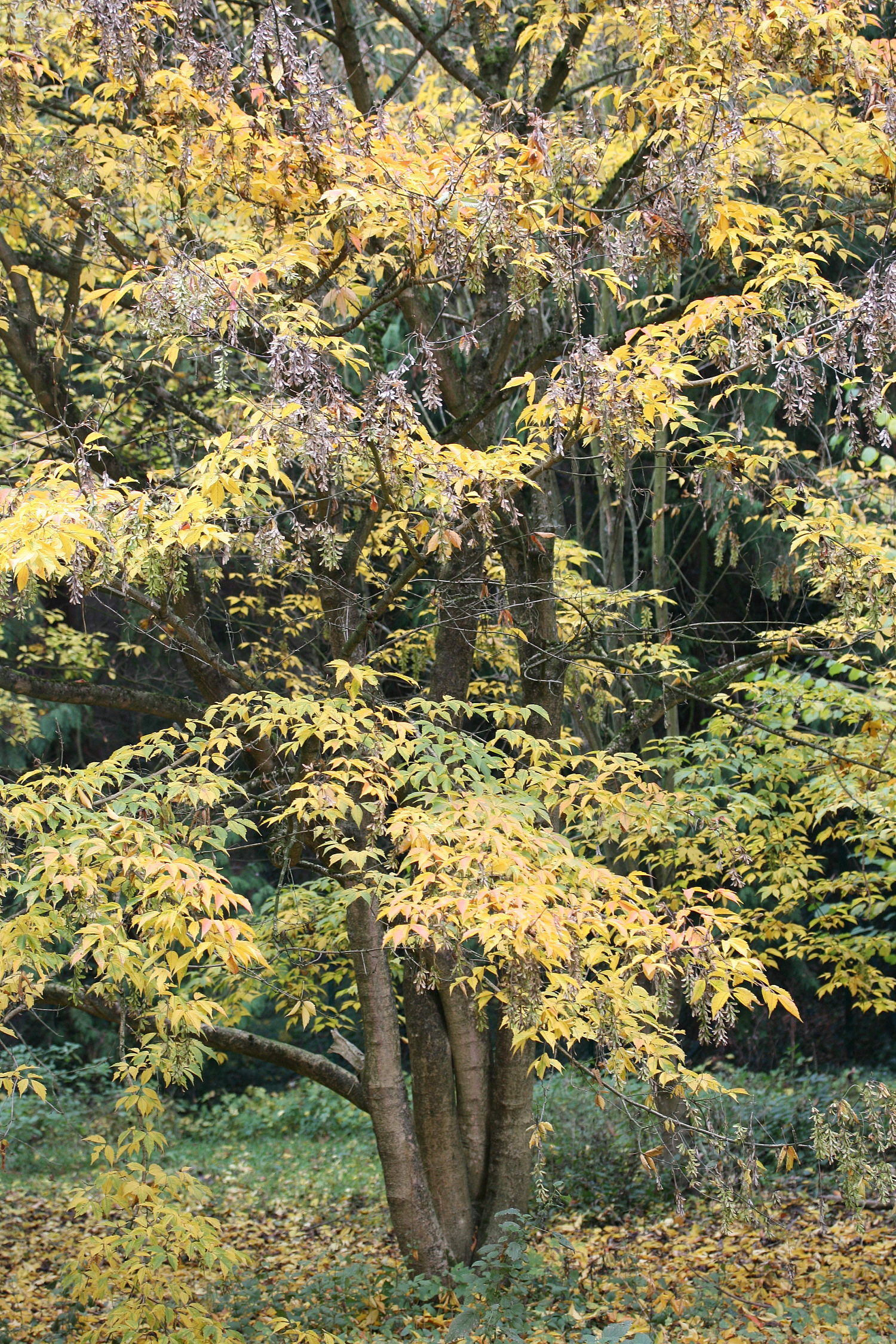 Érable Henry (Acer henryi) Position exacte : Morlanwelz-Mariemont (Belgique) - Parc du domaine de Mariemont.